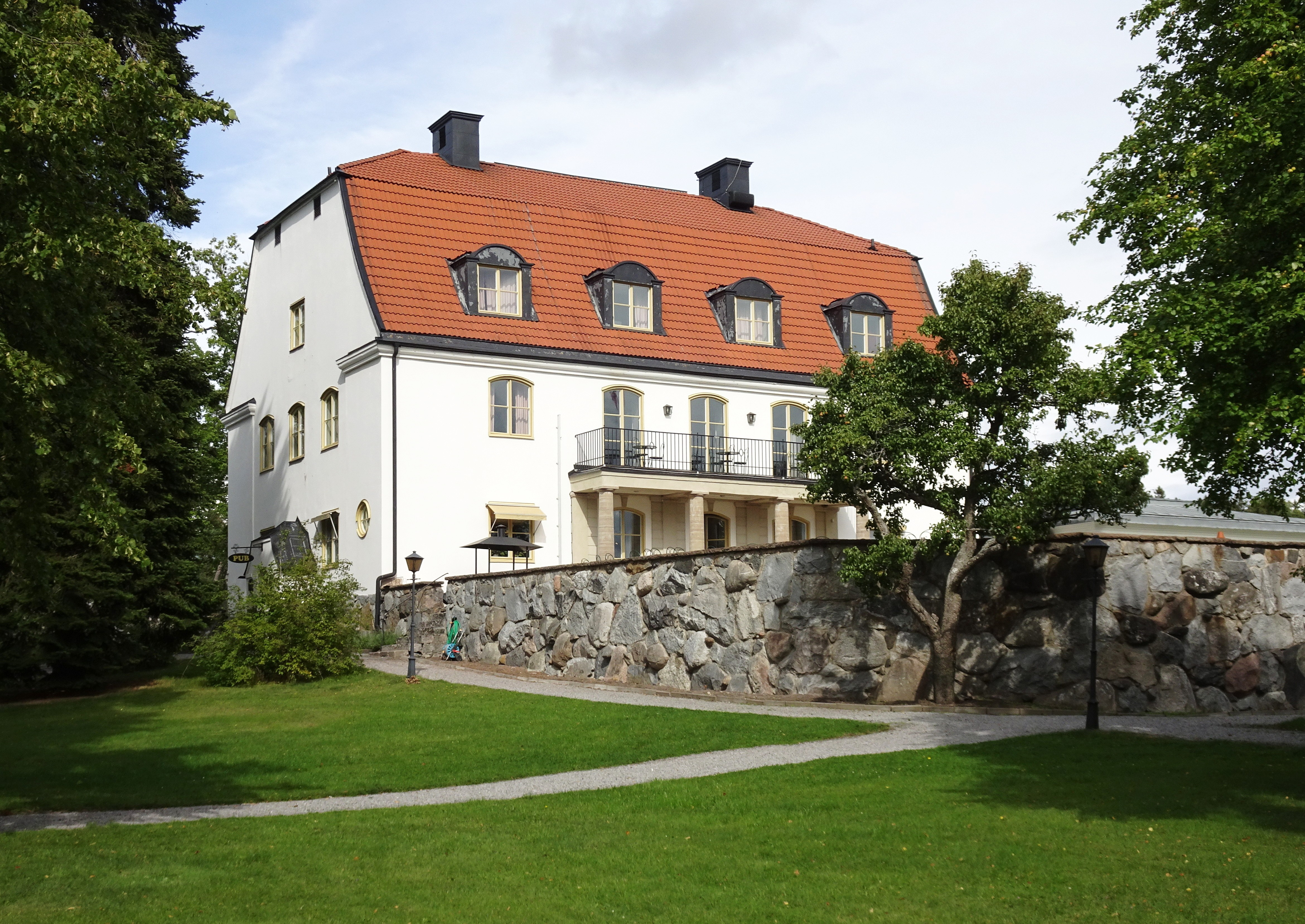 Tammsviks herrgård fasad mot syd